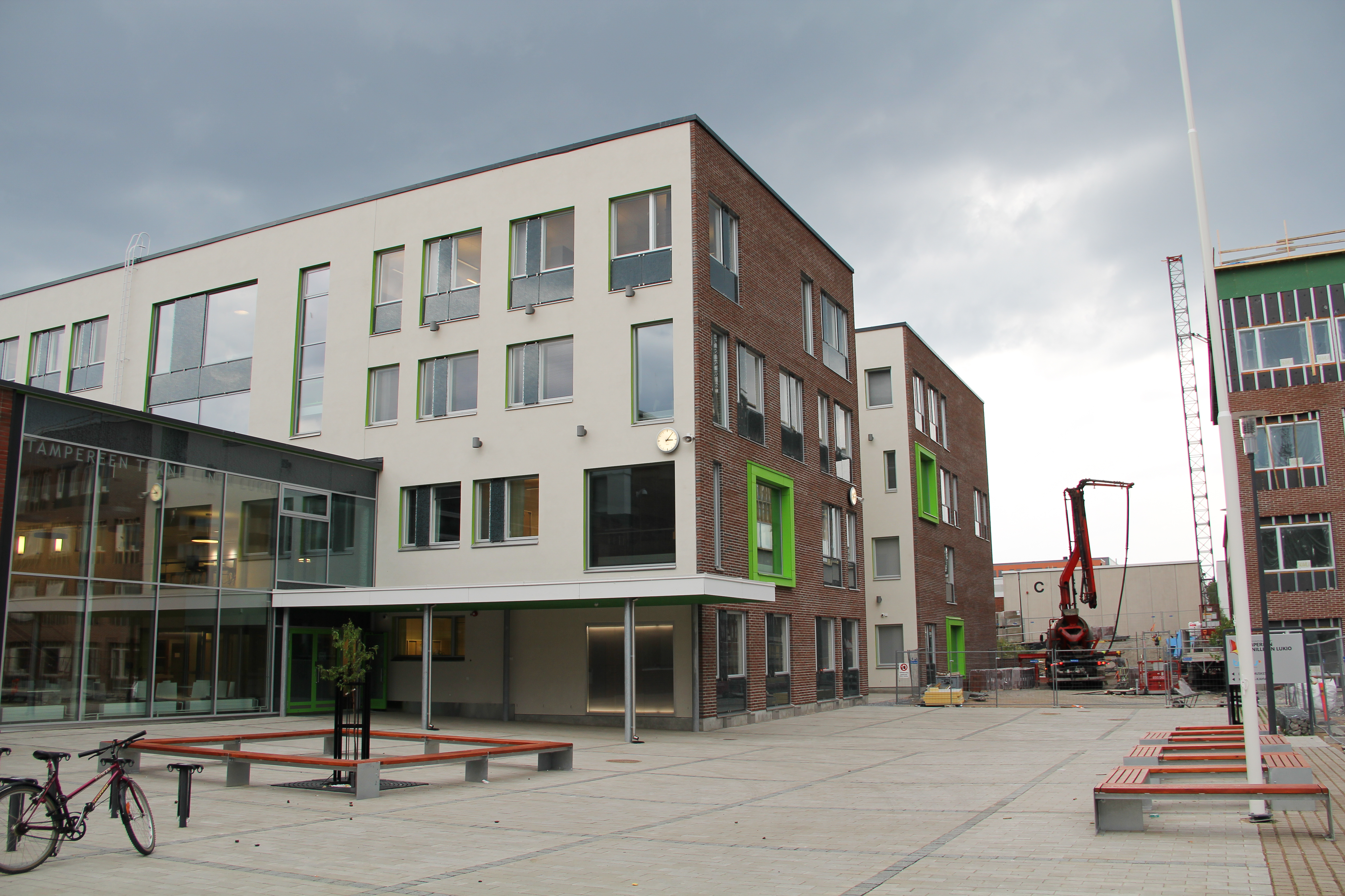 Tampereen Teknillinen Lukio